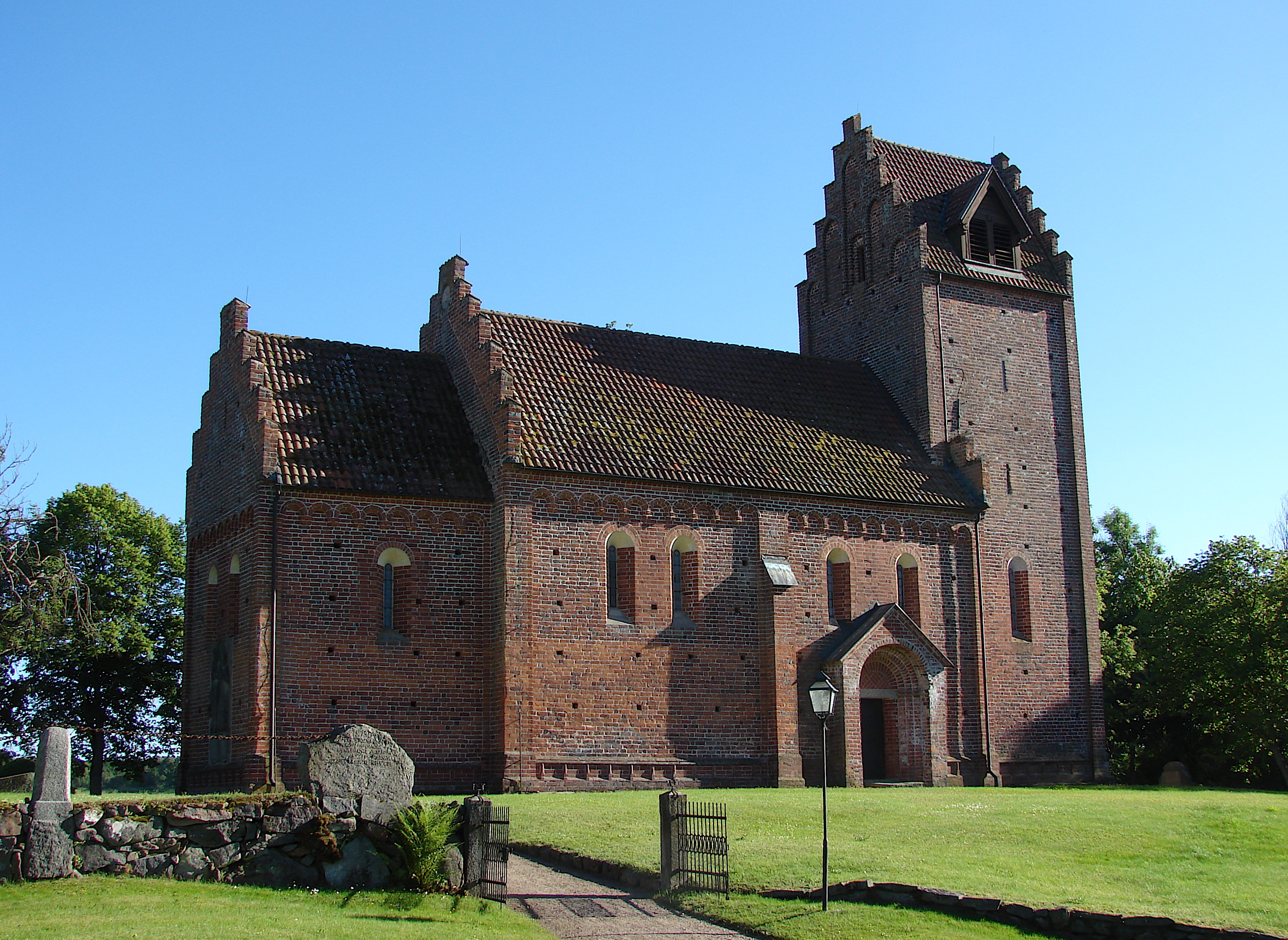 Gumløse kirke, Sinclairsholm